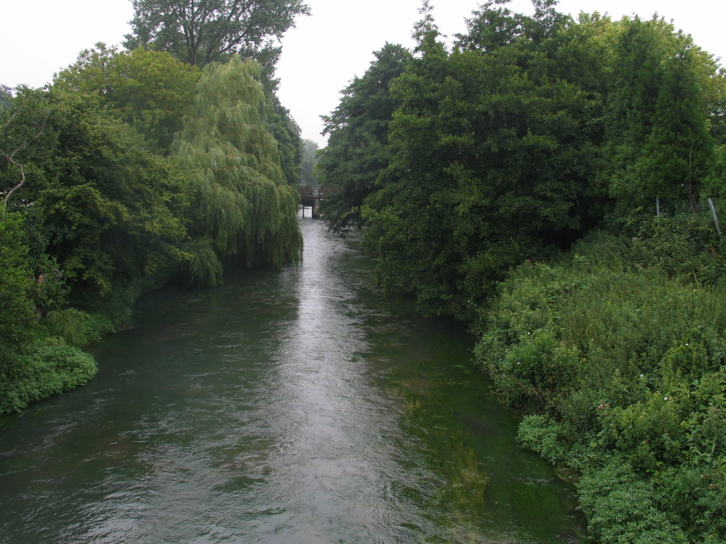 De Aa bij Wizernes - eigen foto